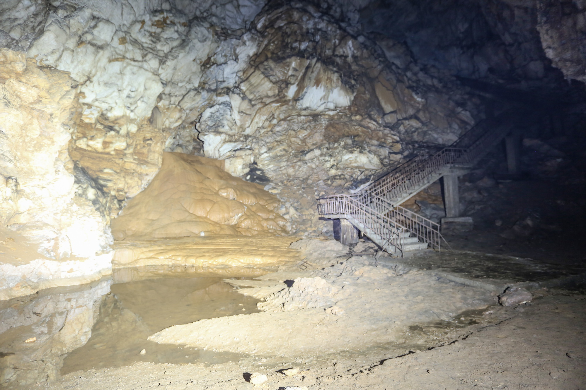 საწურბლიას მღვიმის ბუნების ძეგლი ღირშესანიშნაობა: ბუნების ძეგლი წარმოადგენს ბარემულ კირქვებში გამომუშავებულ სტალაქტიტებით, სტალაგმიტებით, ტრავერტინებითა და დიდი ზომის გურებით მდიდარ მდ. სემის მარცხენა სანაპიროზე მდებარე მღვიმეს. მღვიმის შესასვლელი იხსნება ასიმეტრიული ძაბრის ფსკერზე. შესასვლელის სიგანე 6 მეტრია, პირველ 80 მ სიგრძეზე, ფსკერი დახრილია 12-150 - ით. ბოლომდე ინვითარებს 1 - 1,5 მ სიღრმის საფეხურებს. შესასვლელიდან 125 მეტრში 5 მეტრიიანი ფლატეა, რომელსაც ებმის დიდი ზომის დარბაზი (30X25). შუასაუკუნეებში მღვიმეს იყენებდნენ თავშესაფრად. მდებარეობა: წყალტუბოს მუნიციპალიტეტი, სოფ. ყუმისთავის მიდამოები, მდ. სემის მარცხენა ნაპირი, 287 მეტრი ზღვის დონიდან. კოორდინატები: N42 23.283 E42 36.376